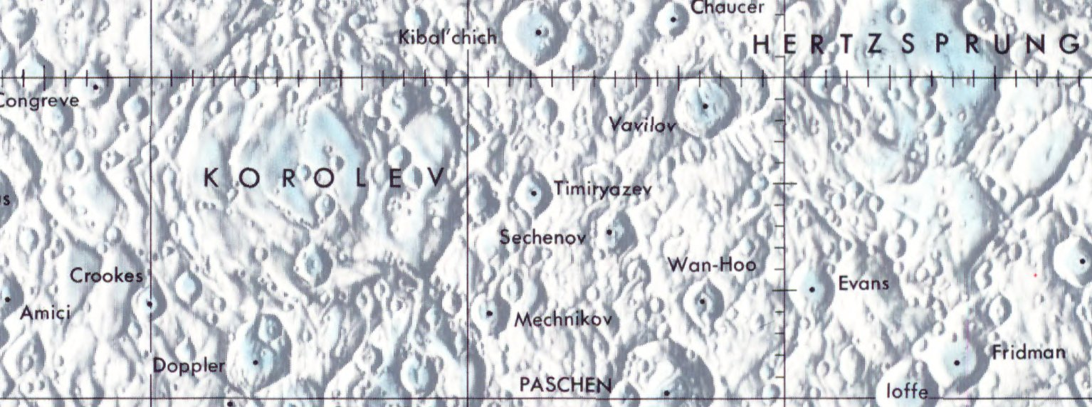 Cráter lunar Timiryazev. Localización. (Lunar Chart LPC1. Second Edition)